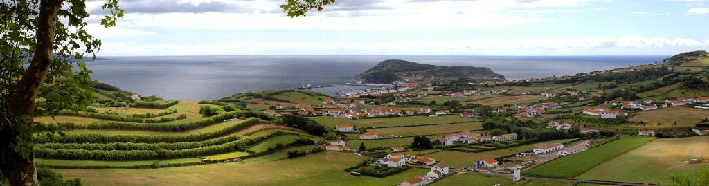 Ciudad y puerto de Horta (isla de Faial) y alrededores